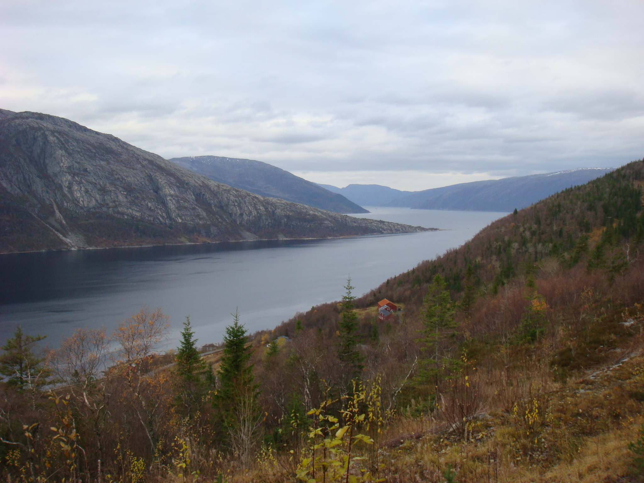 Fiordo Mosjøen, Noruega Novembro 2007